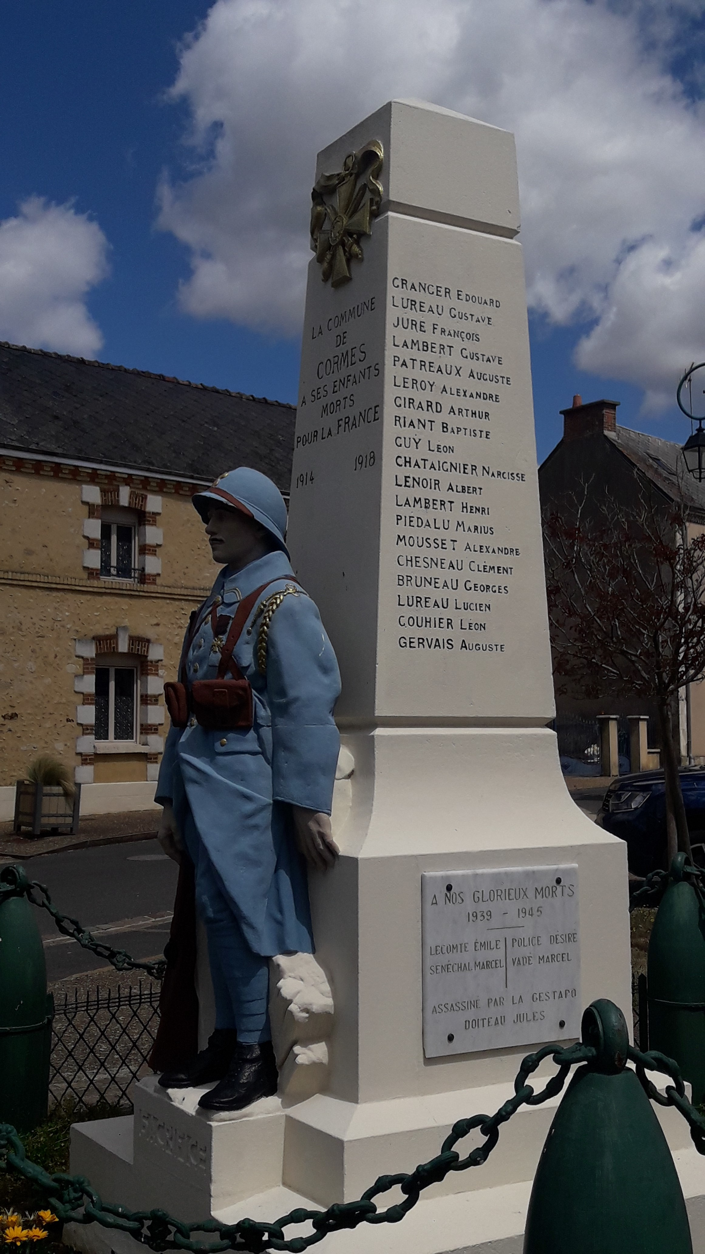 Monument commune de Cormes - Sarthe - France